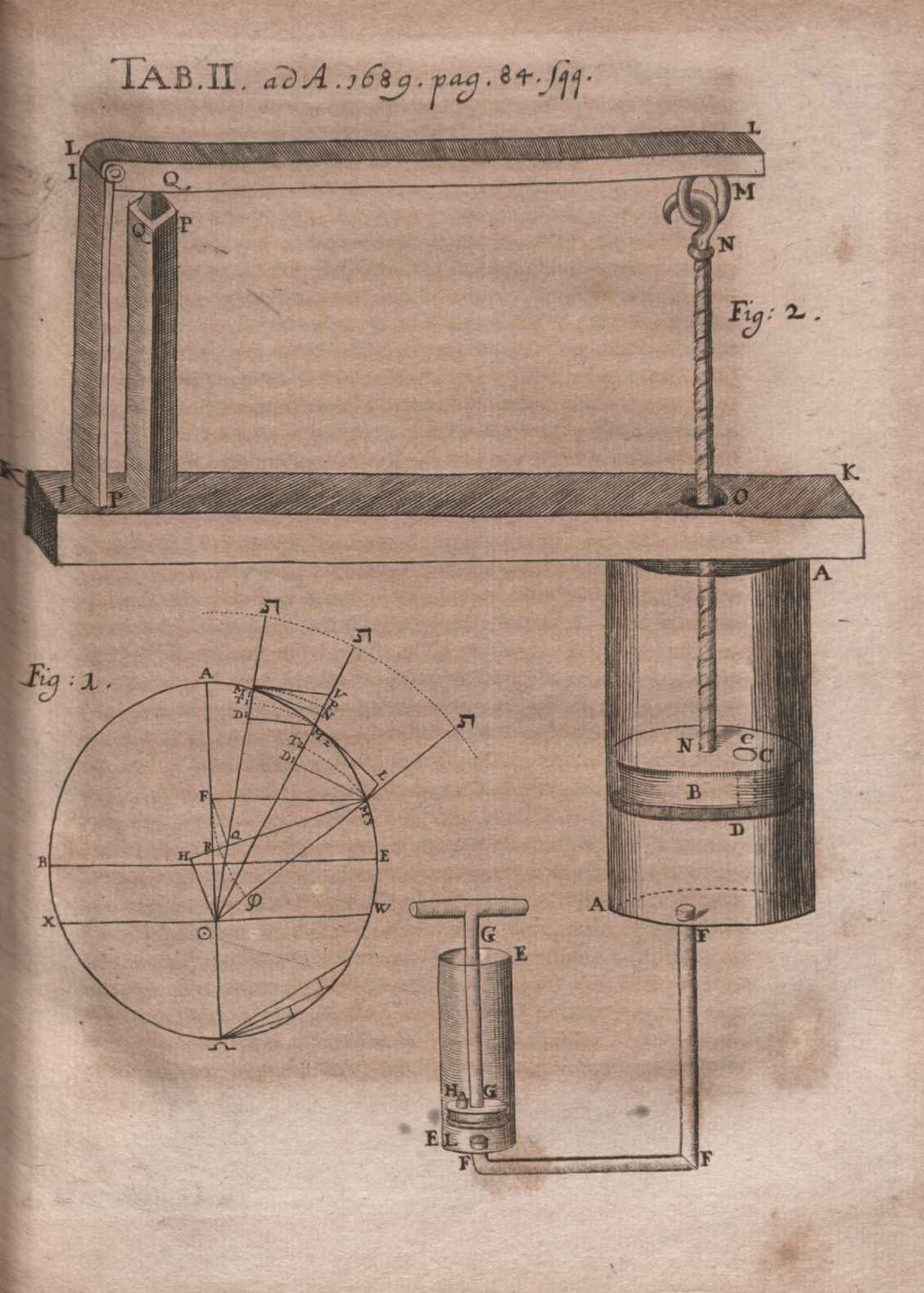 Illustration